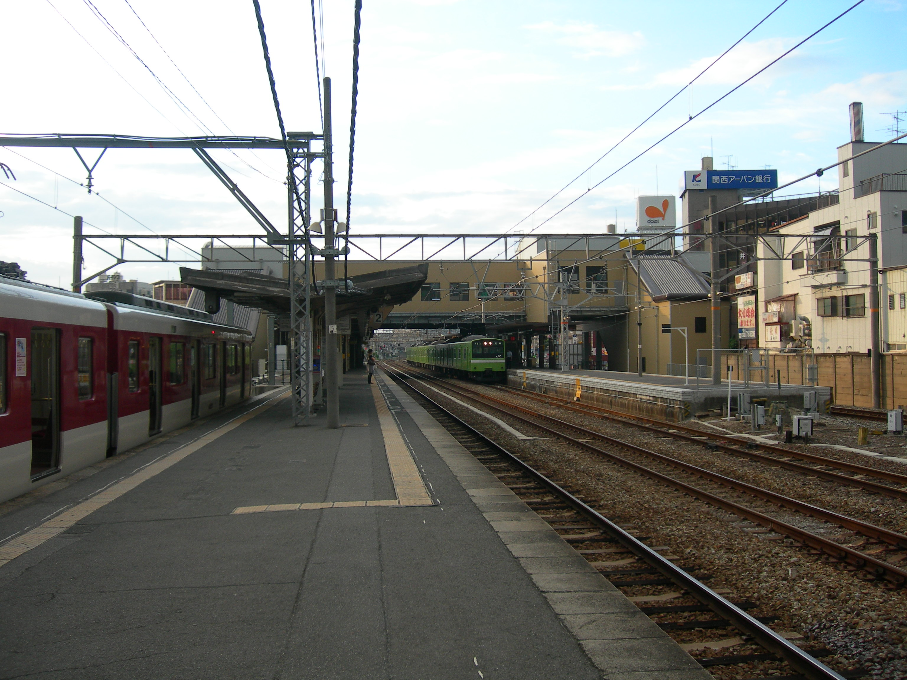 柏原駅 (大阪府)プラットホーム